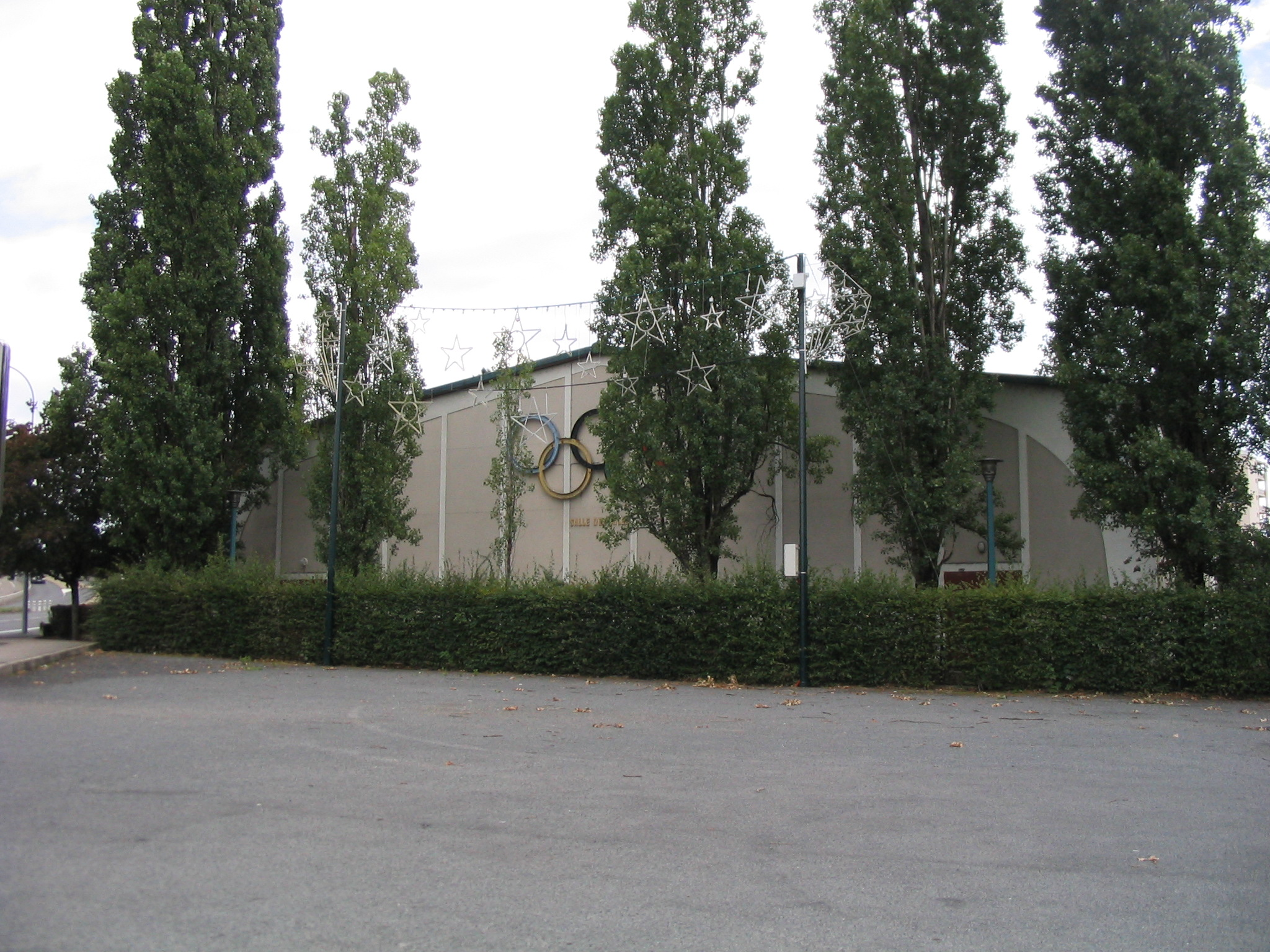 La salle des Ailes, où la Jeanne d'Arc Vichy(Club de basket de Vichy, France) a évolué de 1965 à 1974.